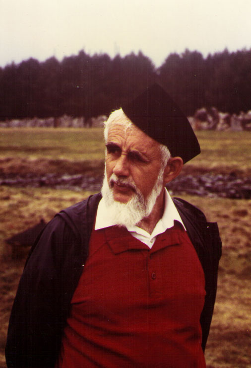 שלום לינדנבאום ספטמר 89' בפולין